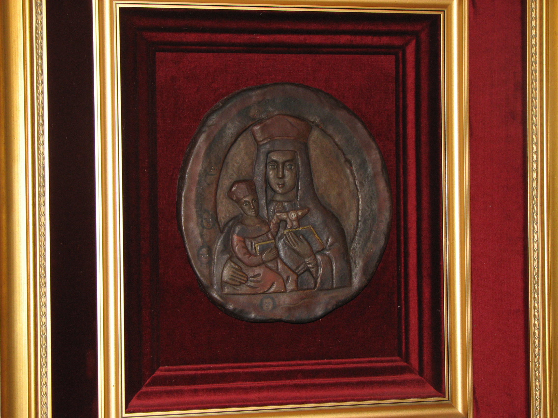 wizerunek Matki Bożej Leśniańskiej (znajdujący się w Pratulinie, w sanktuarium Męczenników Podlaskich).